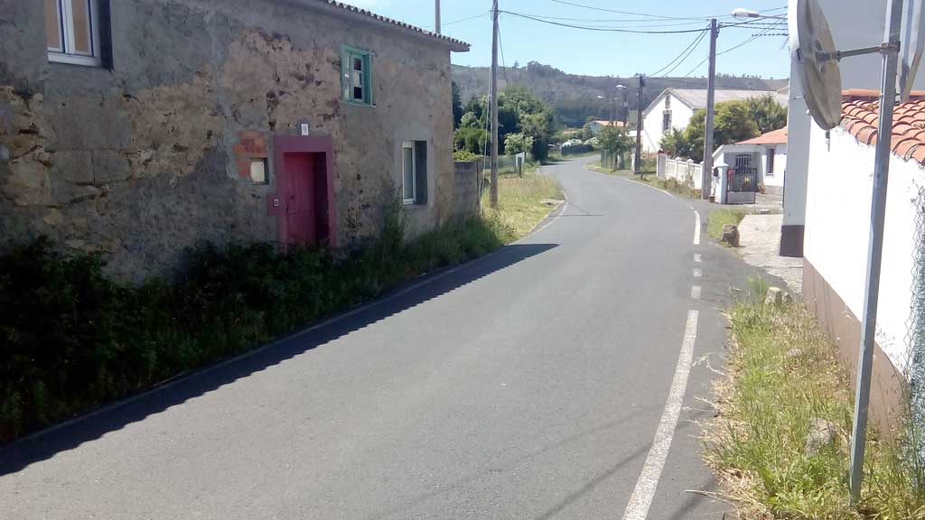 Vista das Carballedas.